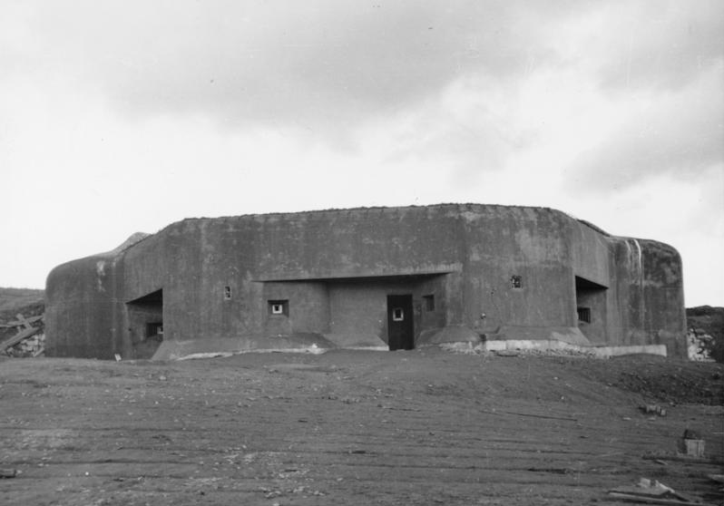 Heeresfilmstelle Einmarsch in das Sudetenland. Schwerer Schartenstand. Bei Schatzlar. Oktober 1938